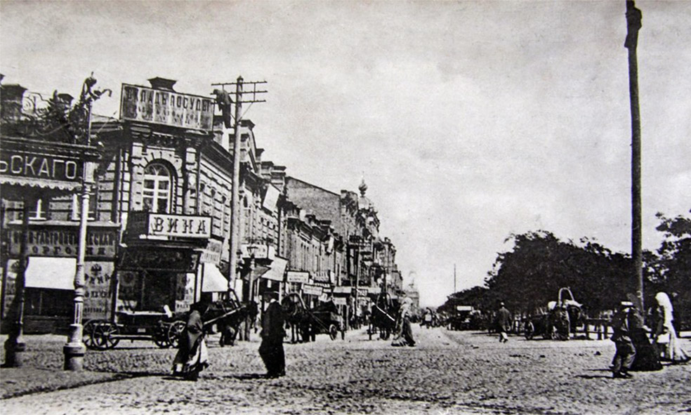 Наріжний будинок (не зберігся) на вулиці Нижній Вал 27-29. Київ